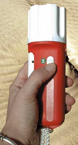 Signalgeber